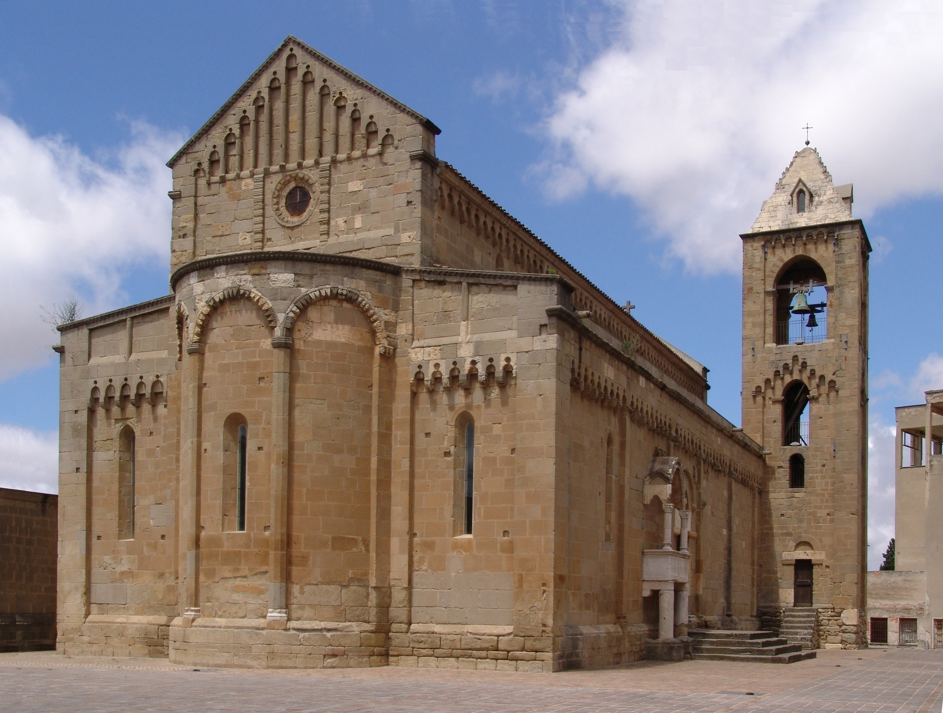 Cattedrale di S. Pantaleo XII- XIII secolo. Facciata posteriore ed il fianco sinistro